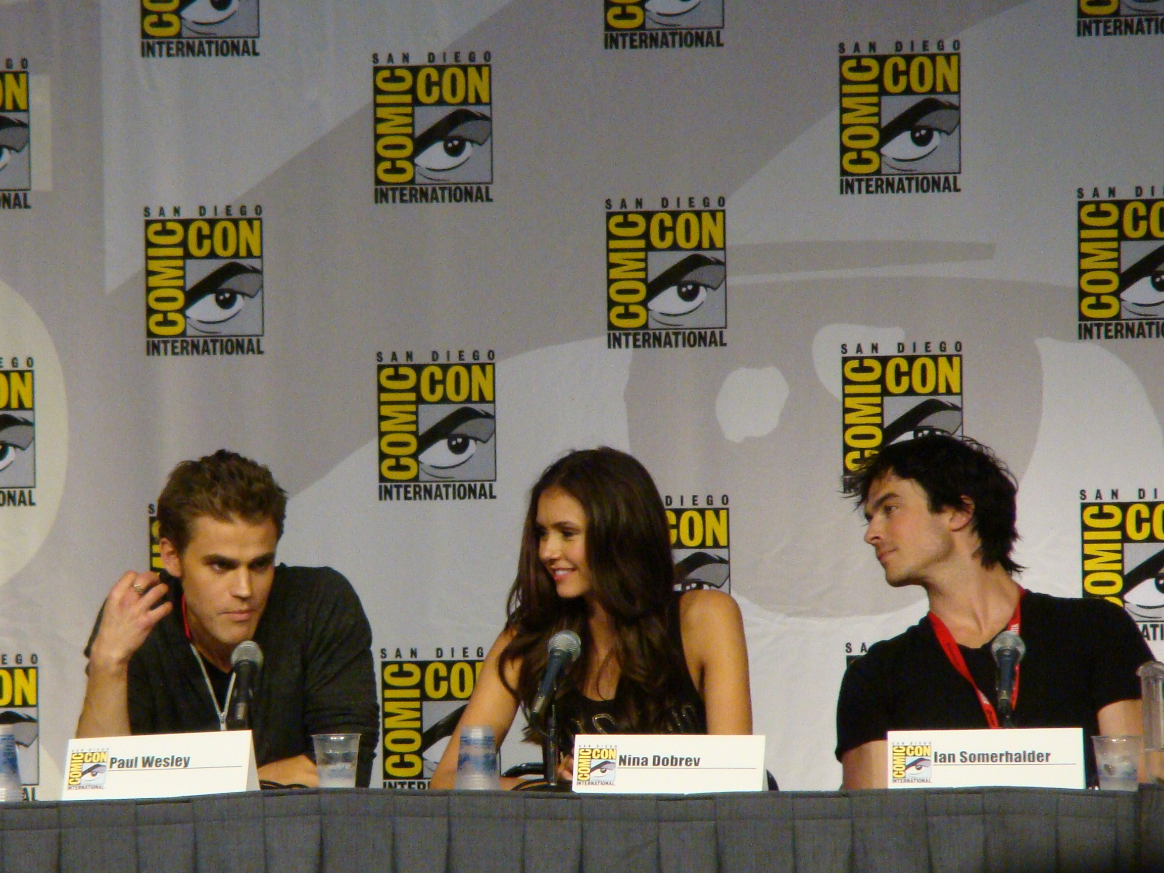 Paul Wesley, Nina Dobrev & Ian Somerhalder